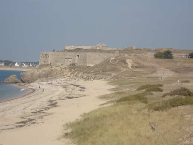 Fort de Penthièvre